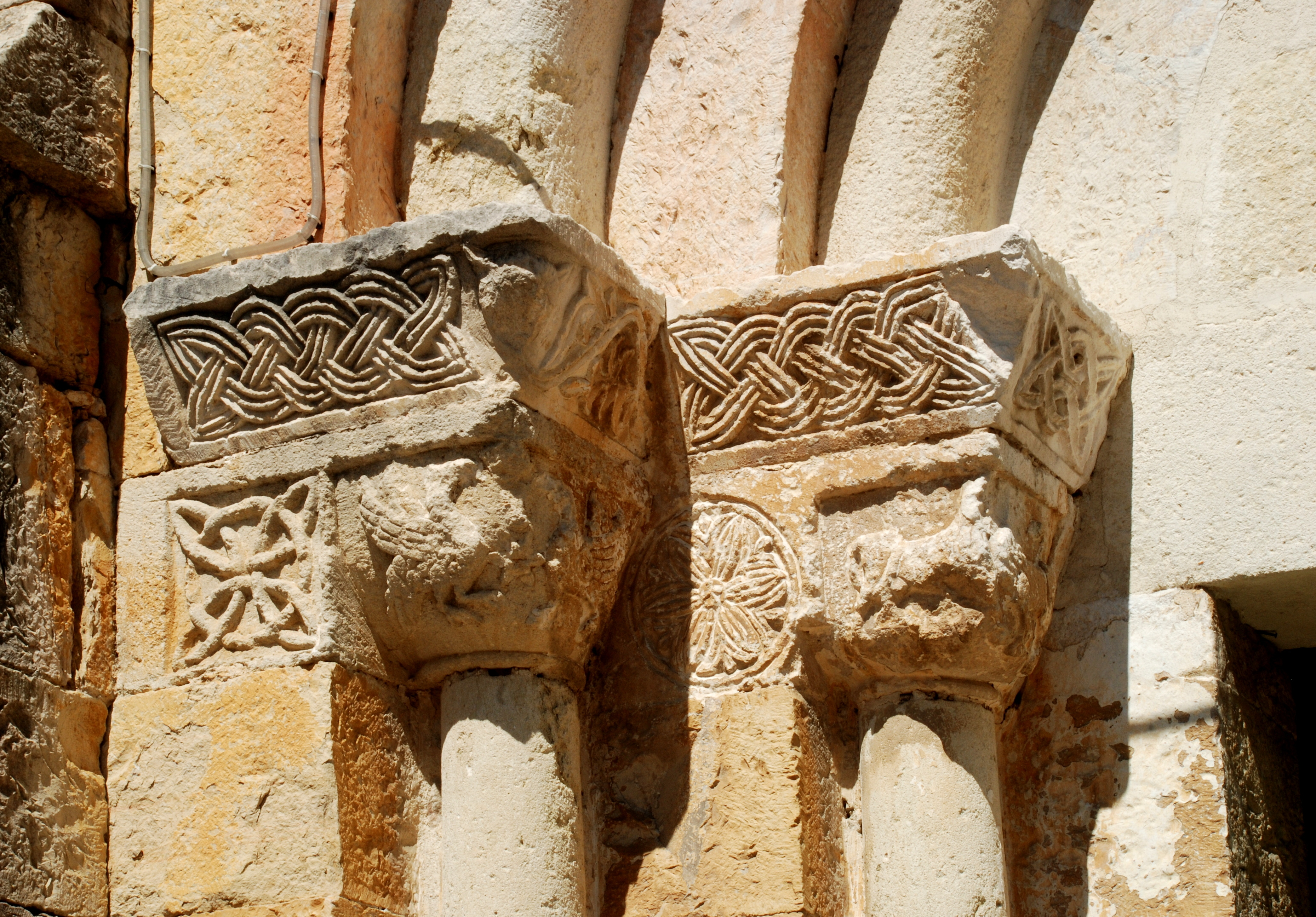 France - Gard - Église Saint-André de Bernis